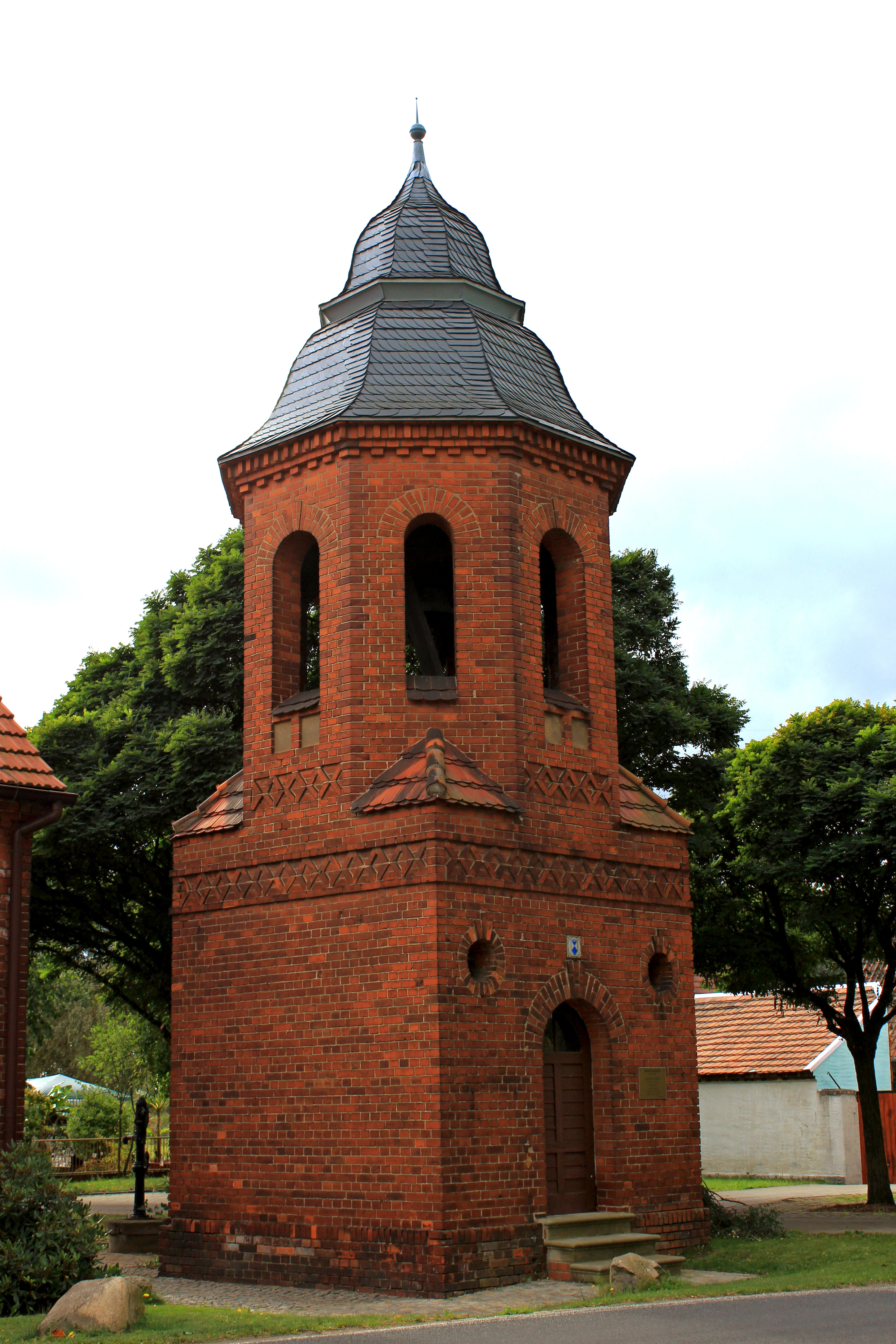 Der unter Denkmalschutz stehende Glockenturm der alten Dorfschule von Zeischa.